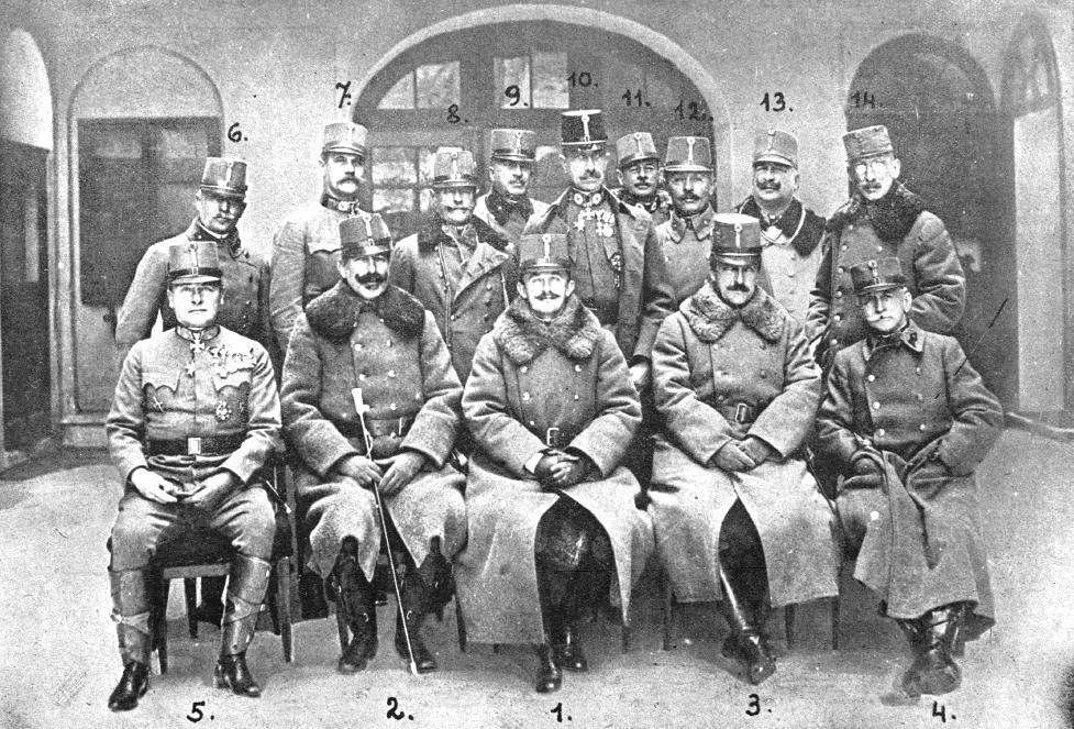 Cesar Karel I. v krogu svojih generalov: 1. Cesar. 2. Nadvojvoda Evgen. 3. Nadvojvoda Jožef. 4. maršal pl. Conrad Hötzendorf. 5. Maršal pl. Kövess. 6. generalni polkovnik pl. Wurm. 7. generalni polkovnik Kritek. 8. generalni polkovnik pl. Krobatin. 9. generalni polkovnik in šef generalnega štaba pl. Arz. 10. generalni polkovnik pl. Böhm-Ermolli. 11. generalni polkovnik pl. Scheuchenstuel. 12. gen. polkovnik pl. Boroëvić 13. gen. polkovnik pl. Rohr. 14. gen. polkovnik pl. Kirchbach.